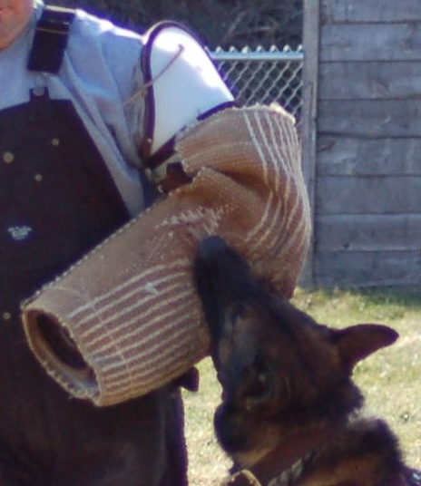 Schutzarm im Fang eines Deutschen Schäferhunds während des Schutzhundtrainings